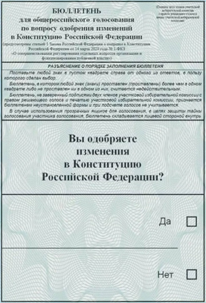 Bulletin de vote utilisé lors du référendum russe de 2020